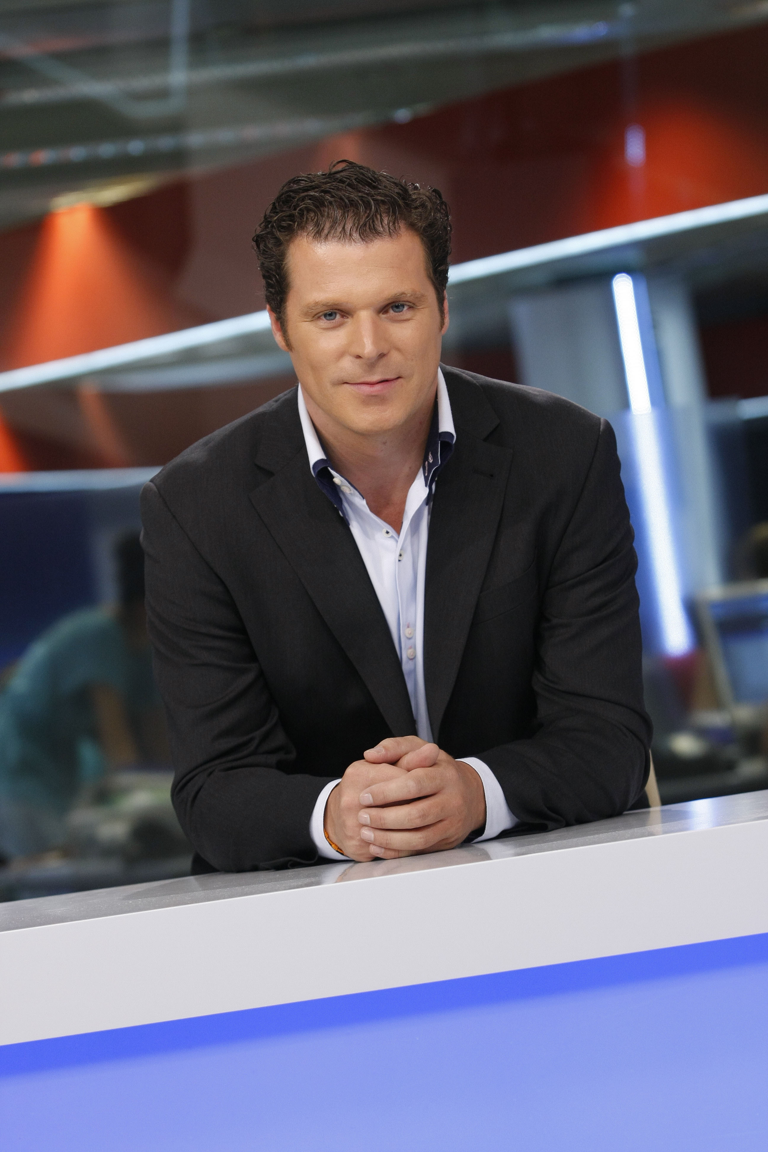 Presentando el Telediario de Telemadrid